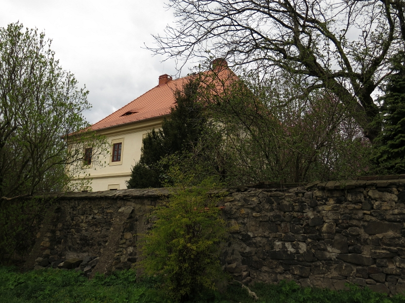 Fara, Dlažkovice 14, Dlažkovice.